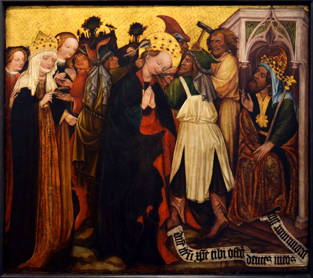 Mistr Rajhradského oltáře, Deska z Náměšti, Umučení sv. Apoleny, Moravská galerie v Brně